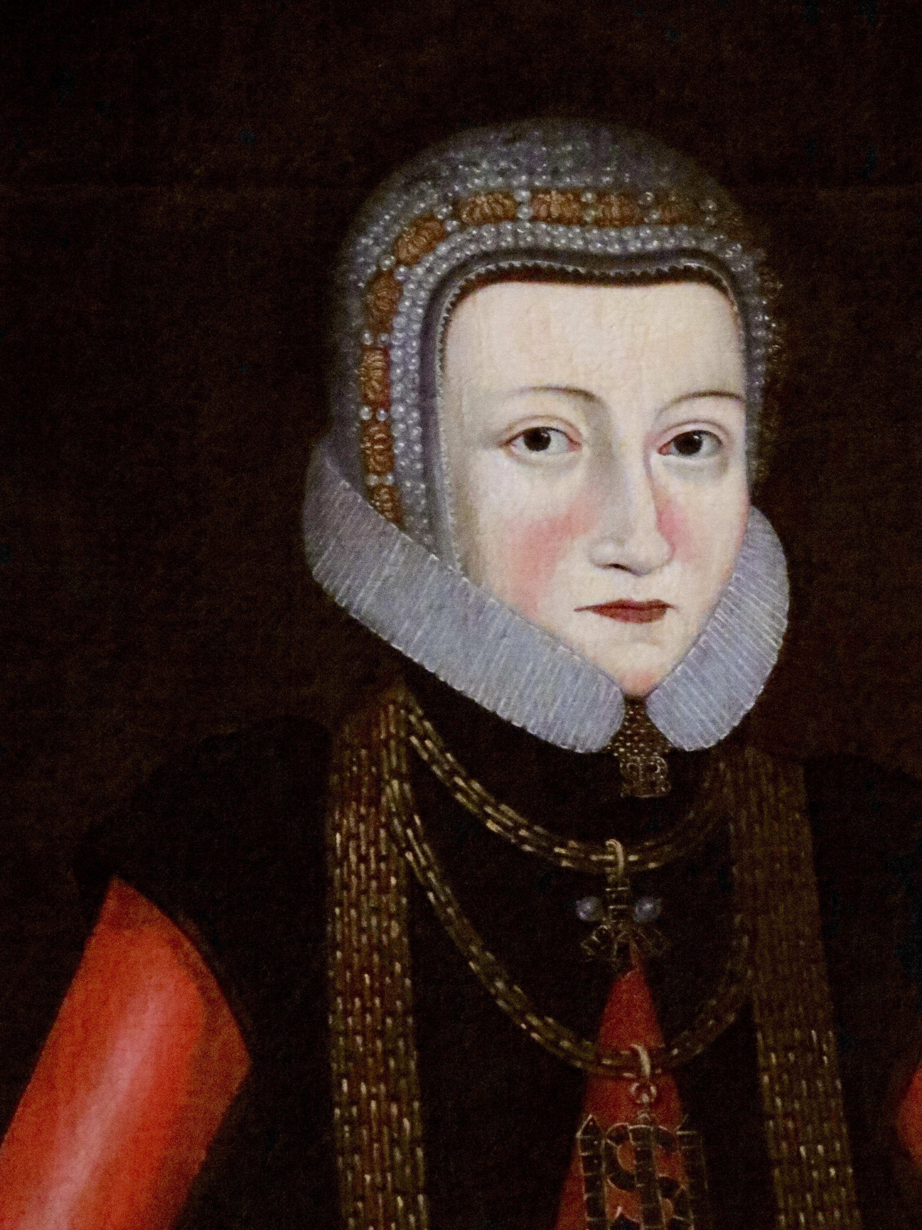 Birgitte Rosenkrantz Ottesdatter til Næsbyholm (1555-1588), udsnit af maleri på Frederiksborg Slot